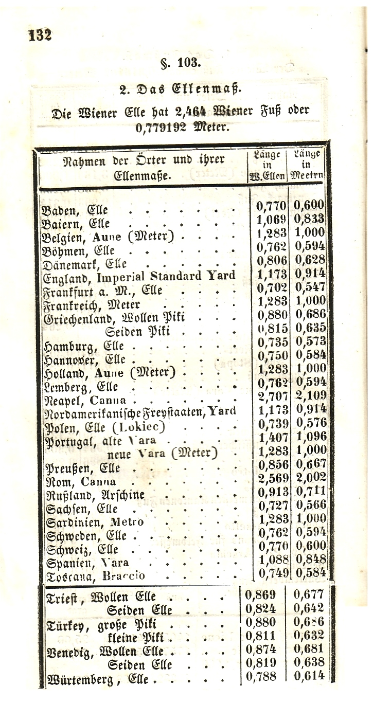 Alte Maßeinheiten / Ellenmaße